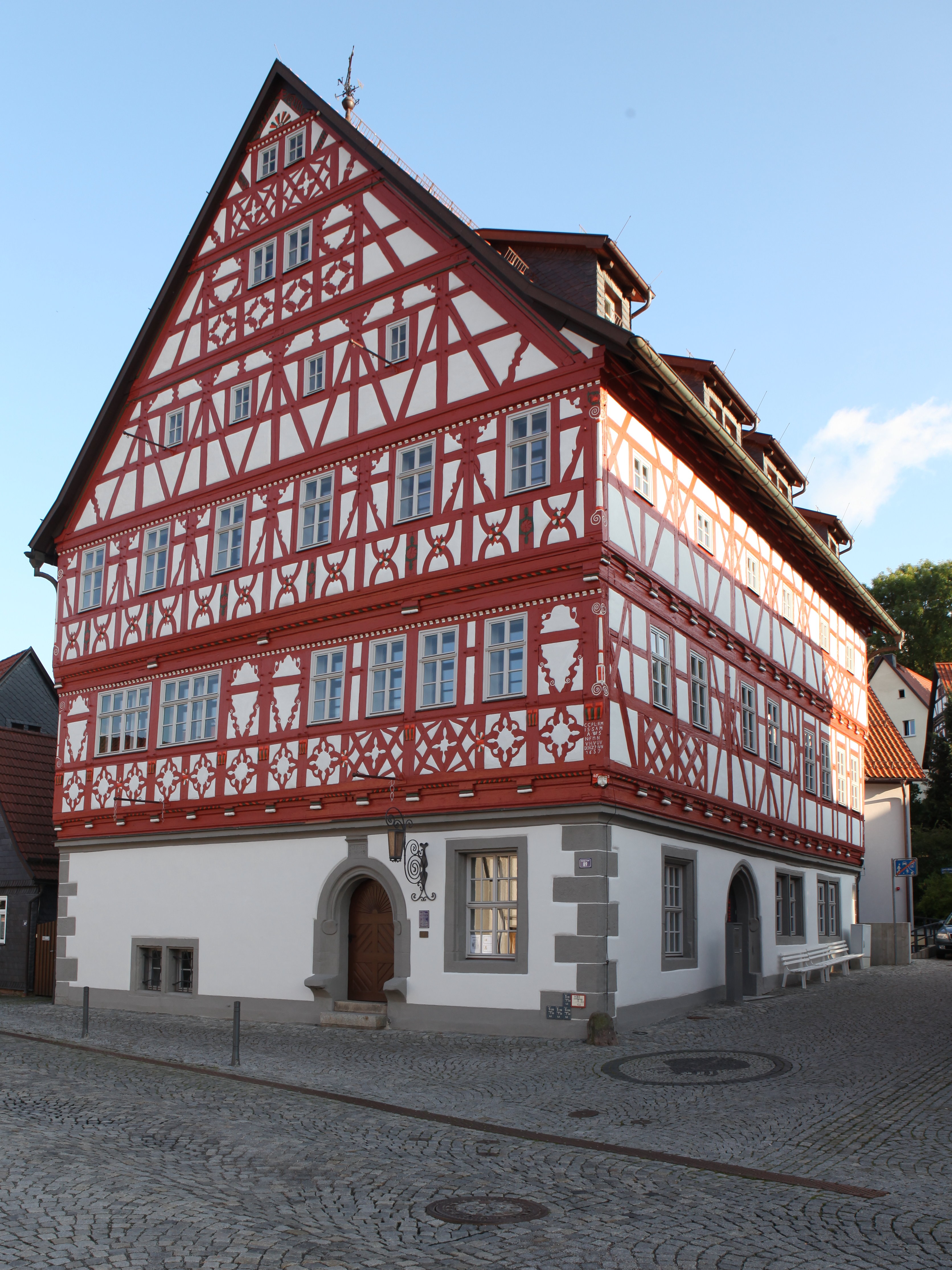 Rathaus, Suhl, OT Heinrichs, Meinigerstraße 89